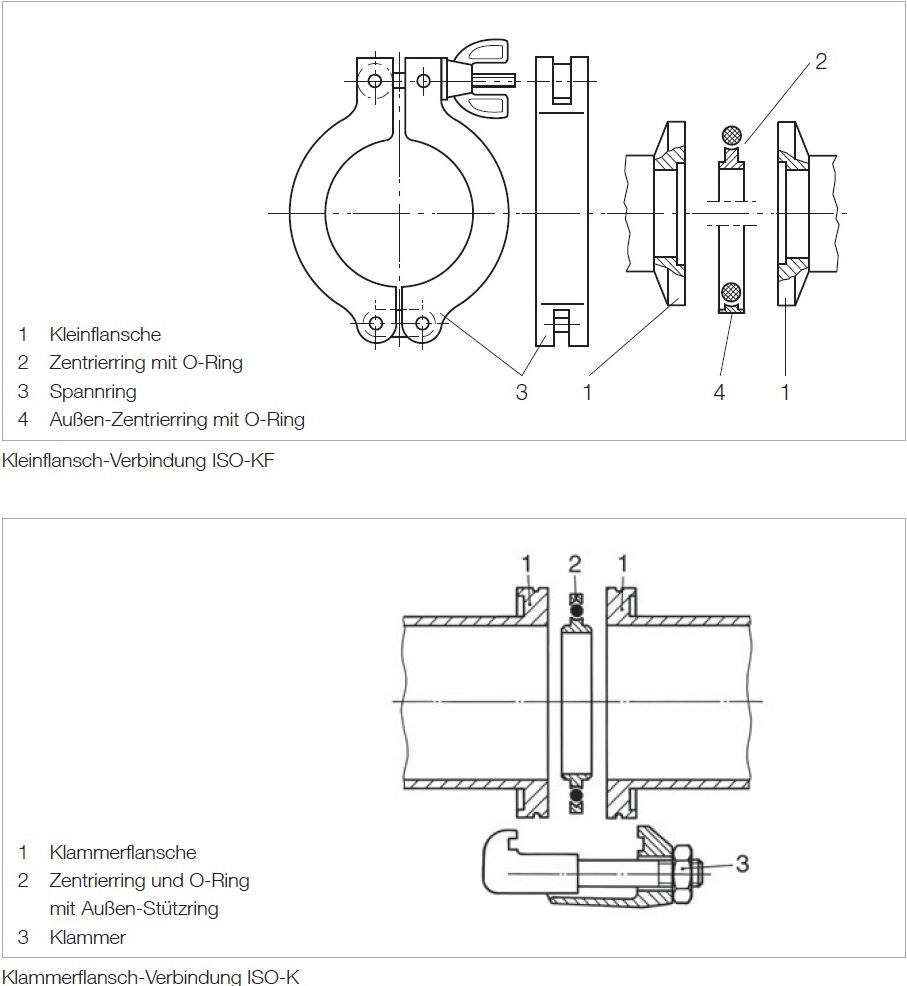 Flanschverbindungen ISO-KF und ISO-K